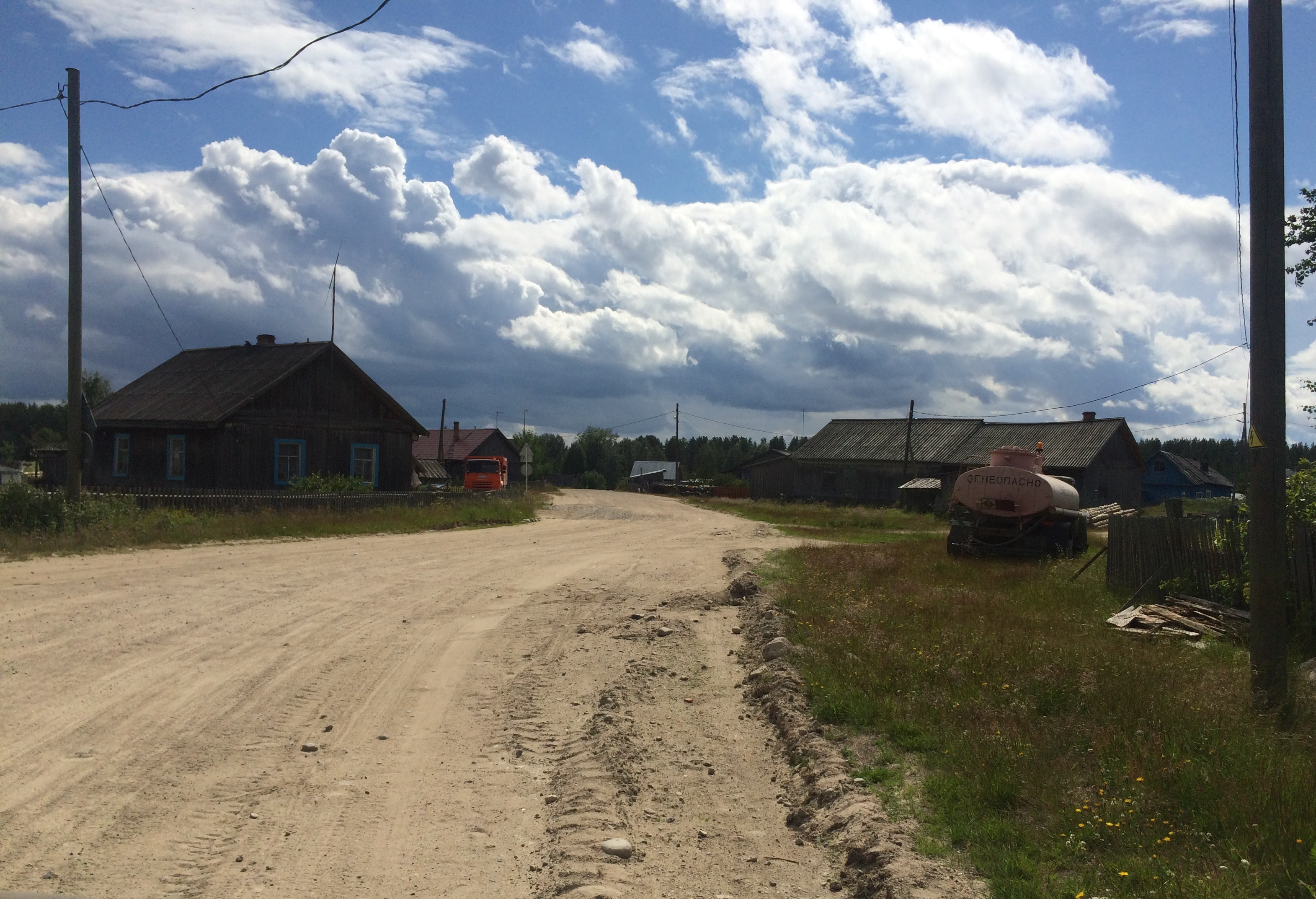 Полга